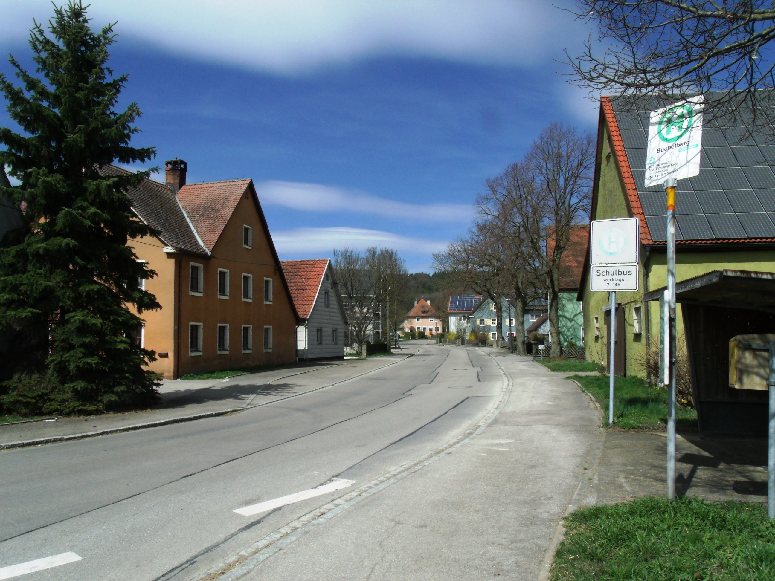 Büchelberg, Ortsteil von Leutershausen im Landkreis Ansbach